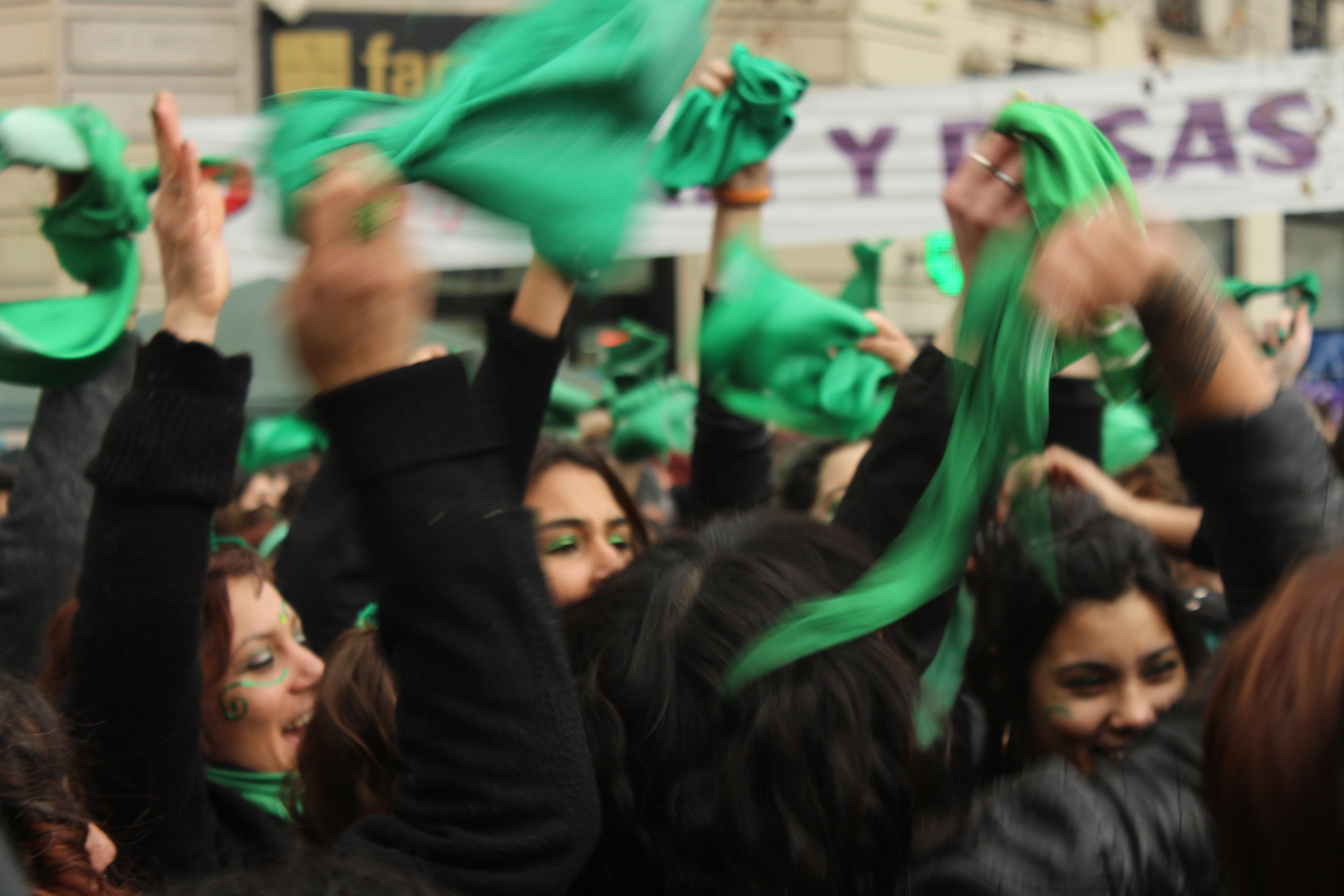 Marcha a favor del aborto legal seguro y gratuito durante la votación de la ley en el Senado de la Nación. Ciudad de Buenos Aires